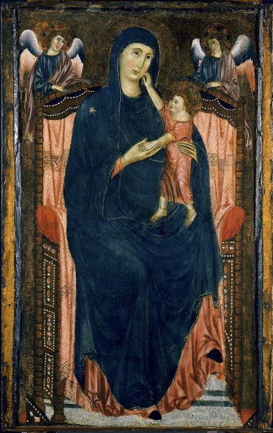 Maestro di varlungo, maestà, MET